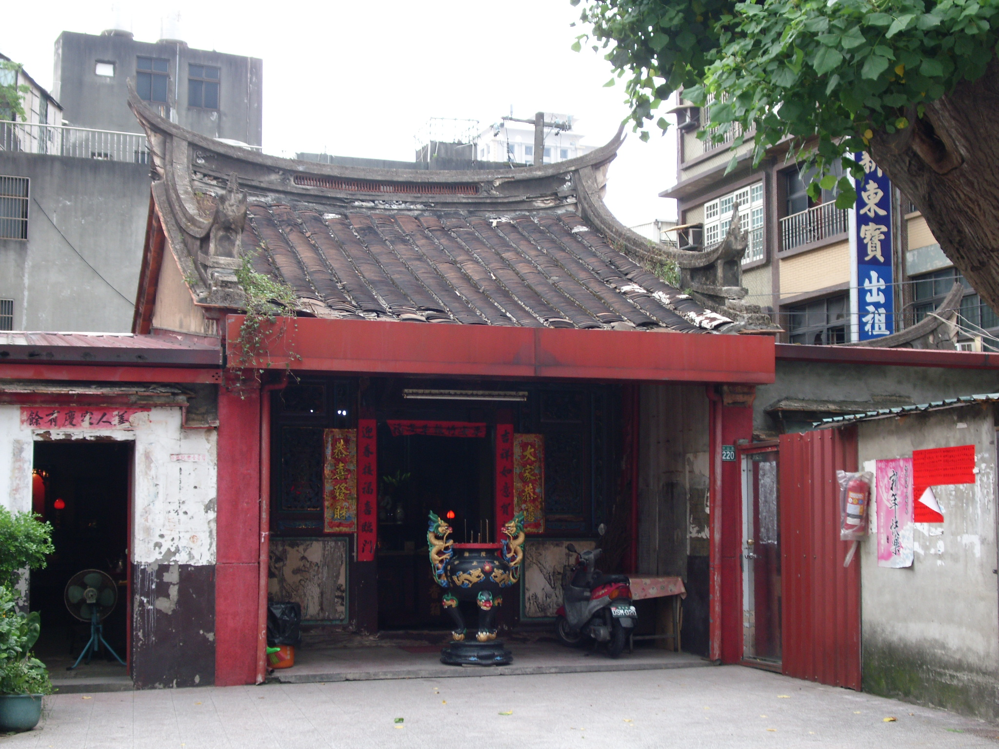 Bân-lâm-gú: 桃園市西廟